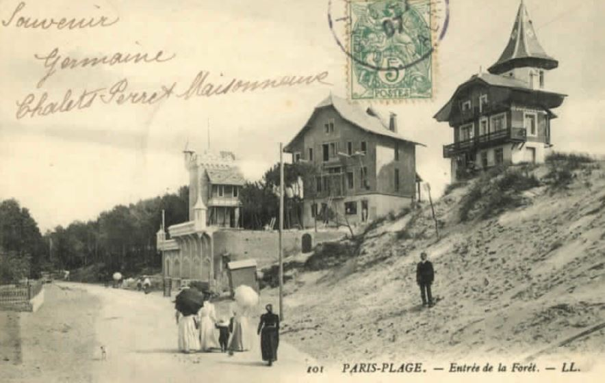 Le Touquet-Paris-Plage - cp - Entrée de la forêt à l'époque de Paris-Plage